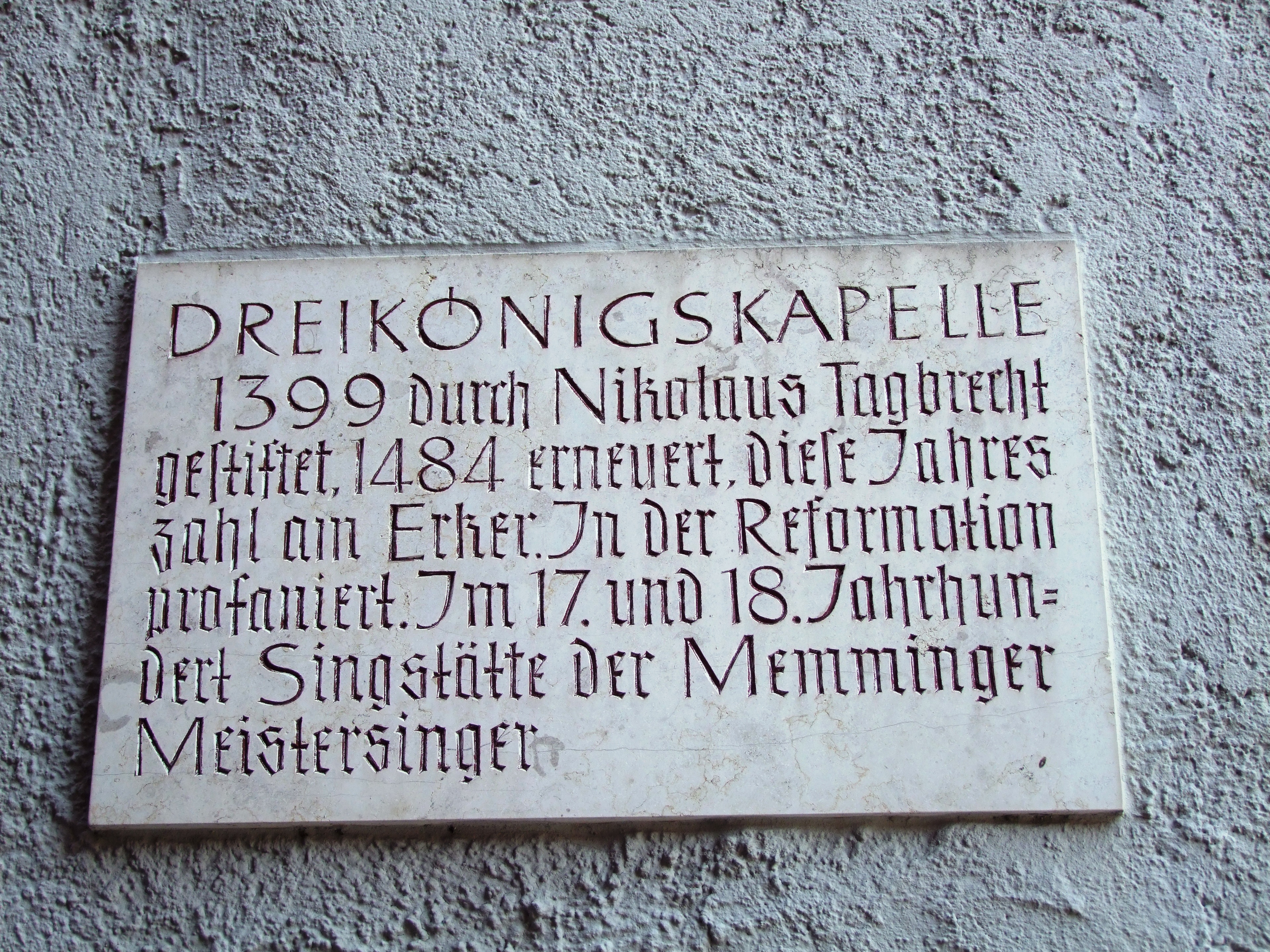 Kalchstraße 29, Inschriftentafel zur Dreikönigskapelle im oberschwäbischen Memmingen.